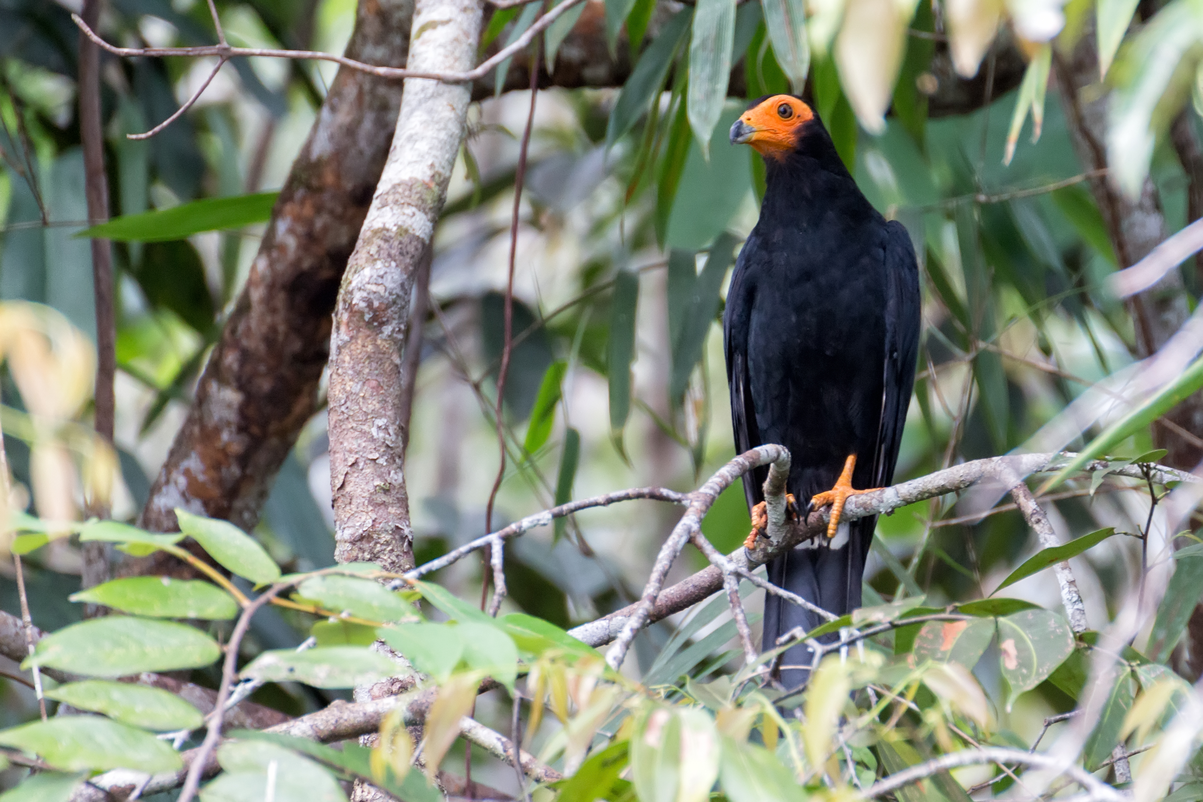 Black Caracara | Chupacacao Negro (Daptrius ater)